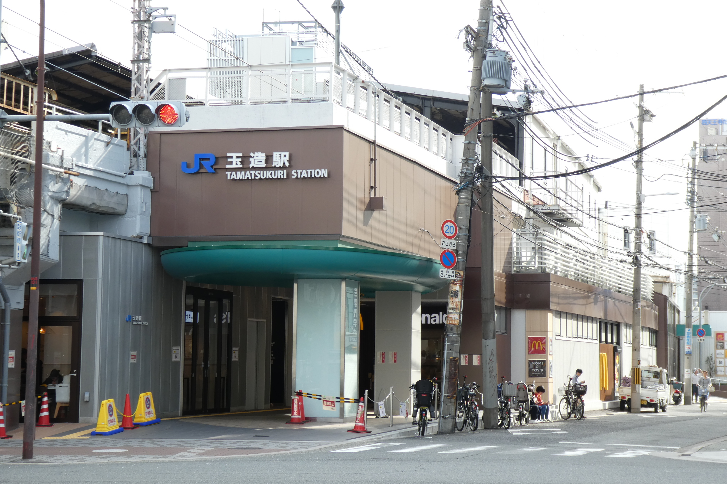 大阪環状線玉造駅北口